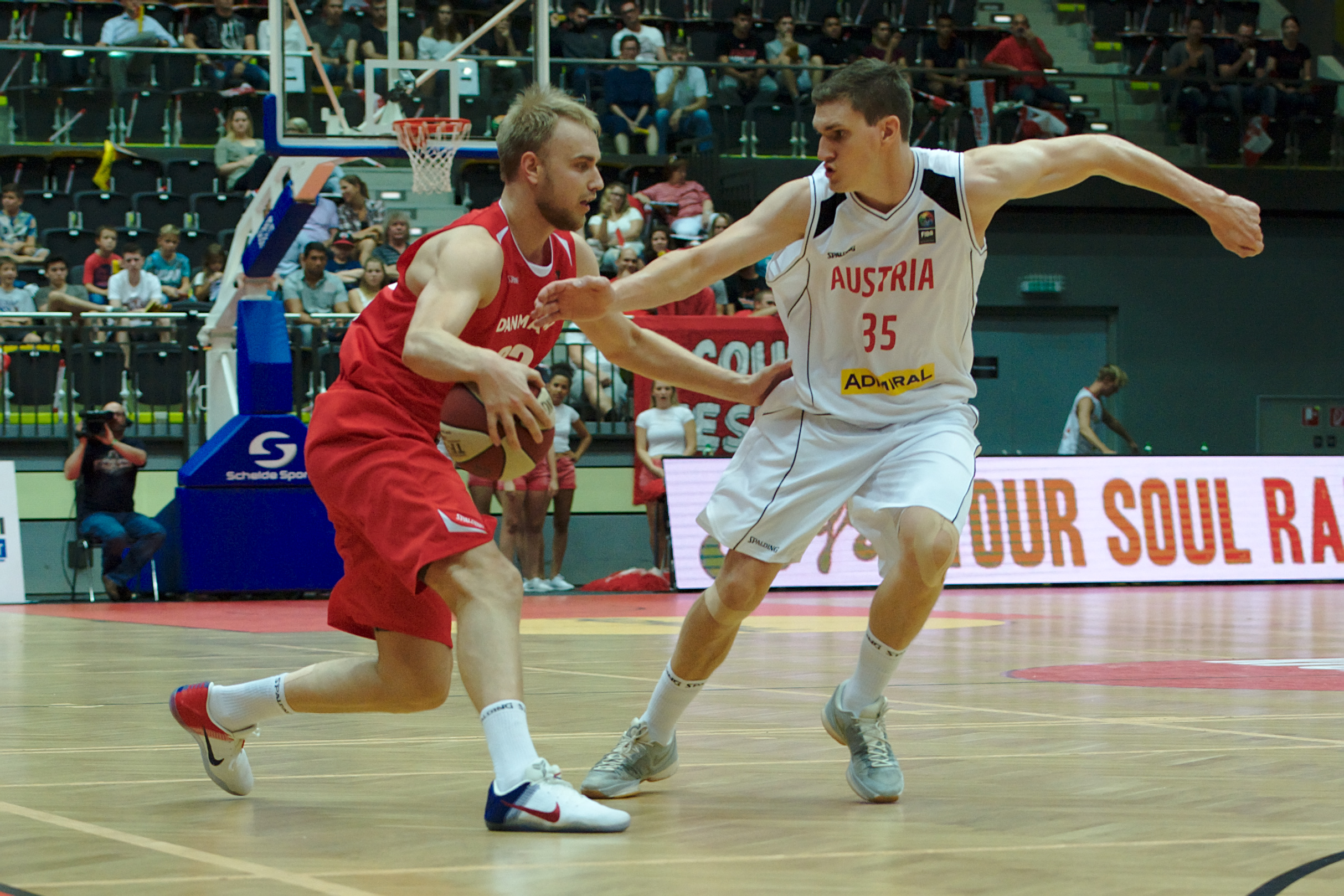 FIBA-Basketball EM-Qualifikation am 7.9.2016 im Multiversum in Schwechat, Österreich - Dänemark. Bild zeigt Sebastian Koch (AUT) und Jonathan Gilling (DEN).